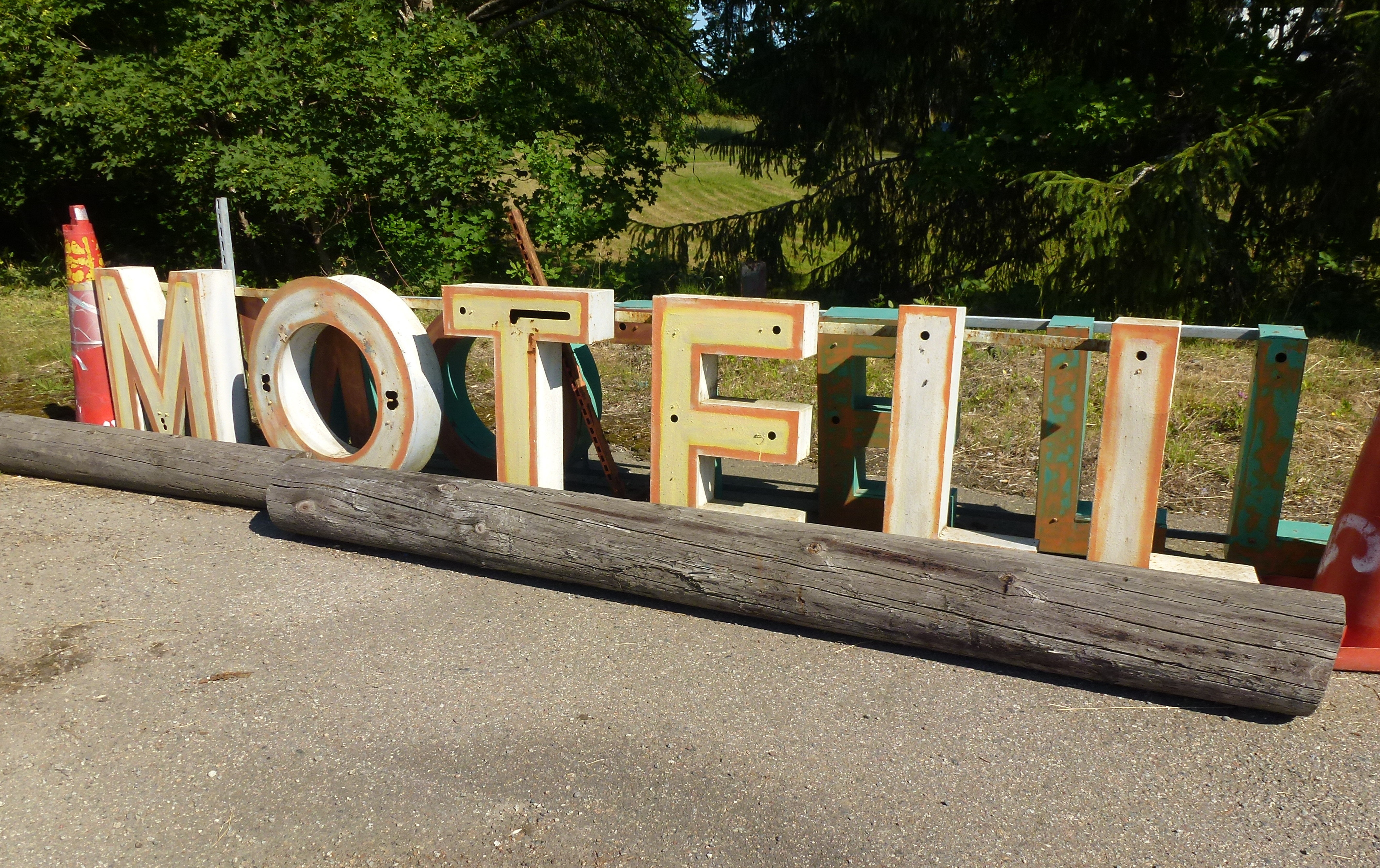 Sävsta motell demonterad skylt